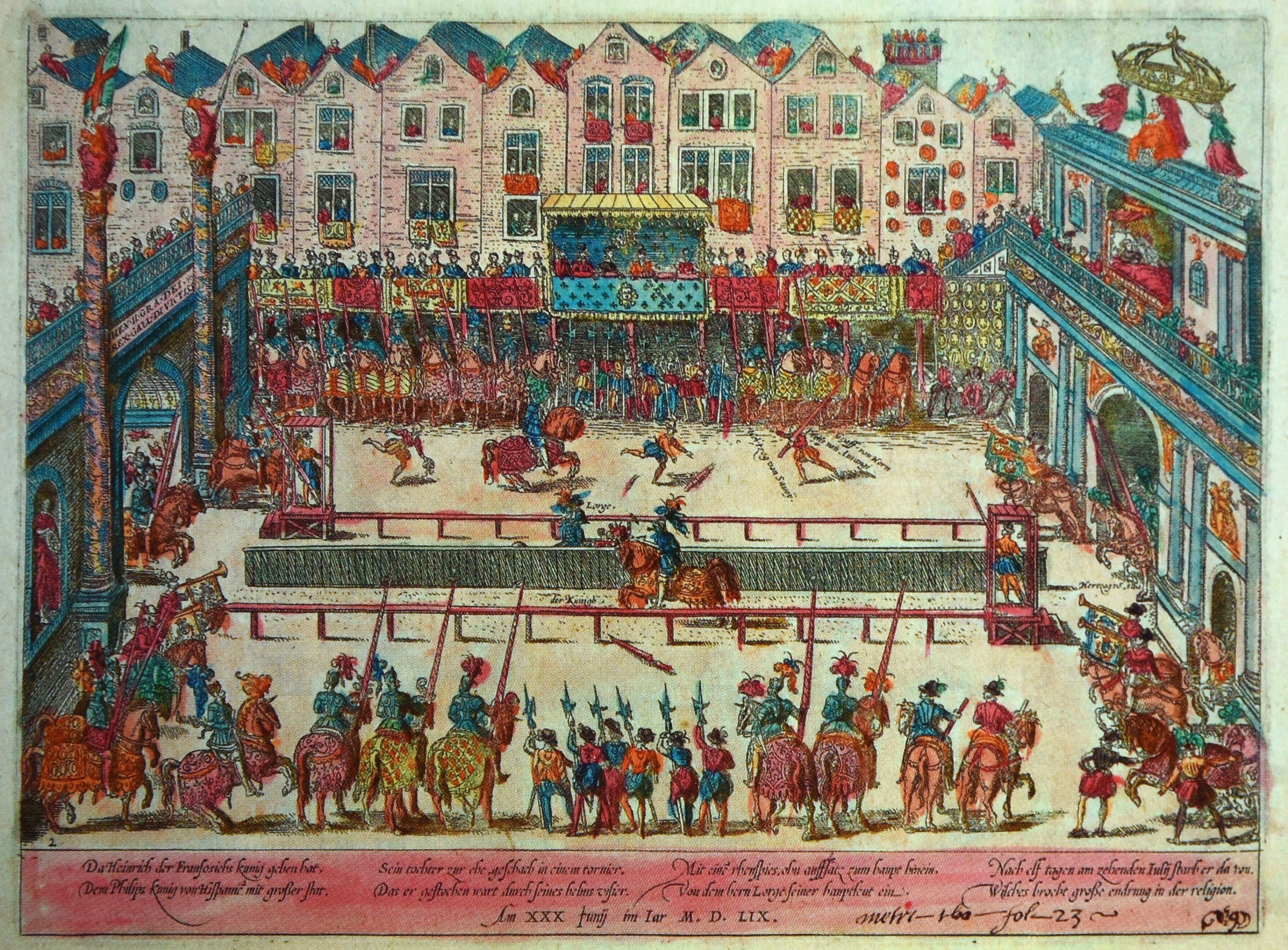 Gravure door Frans Hogenberg (1535-1590) - Koning Hendrik II dodelijk verwond in 1559 door Gabriel de Lorges door speer in oog tijdens toernooi na de vrede van Cateau-Cambrésis